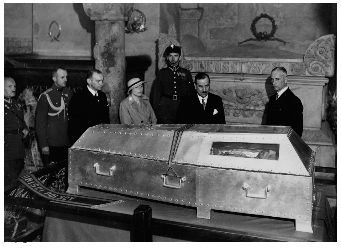 Посланикът на България в Полша Сава Киров (в средата) при поклонение пред саркофага на Юзеф Пилсудски, в компанията на краковския войвода Владислав Рачкевич (в дясно).